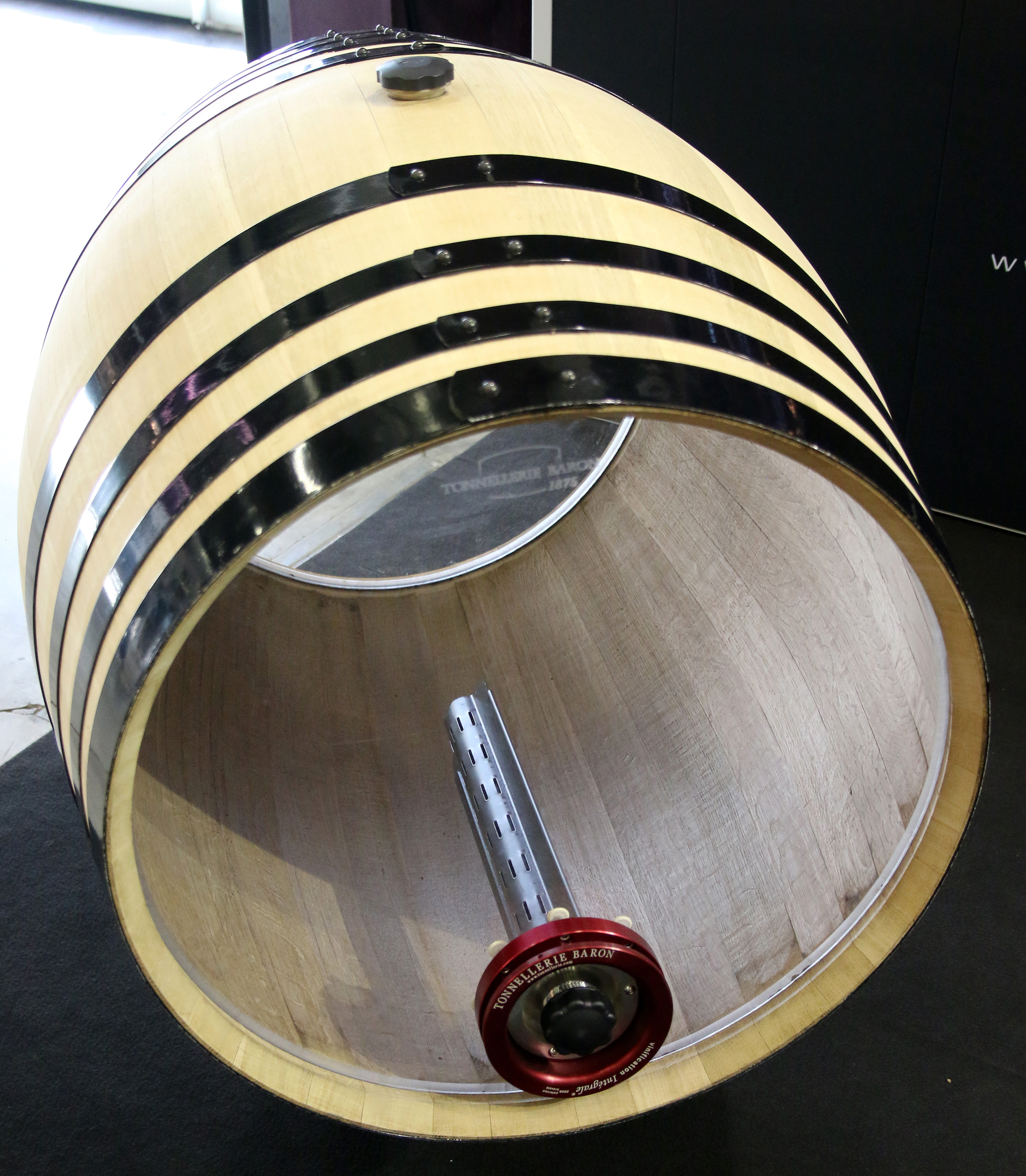 Schaubarrique mit Glasböden und Füllstutzen im Faßboden